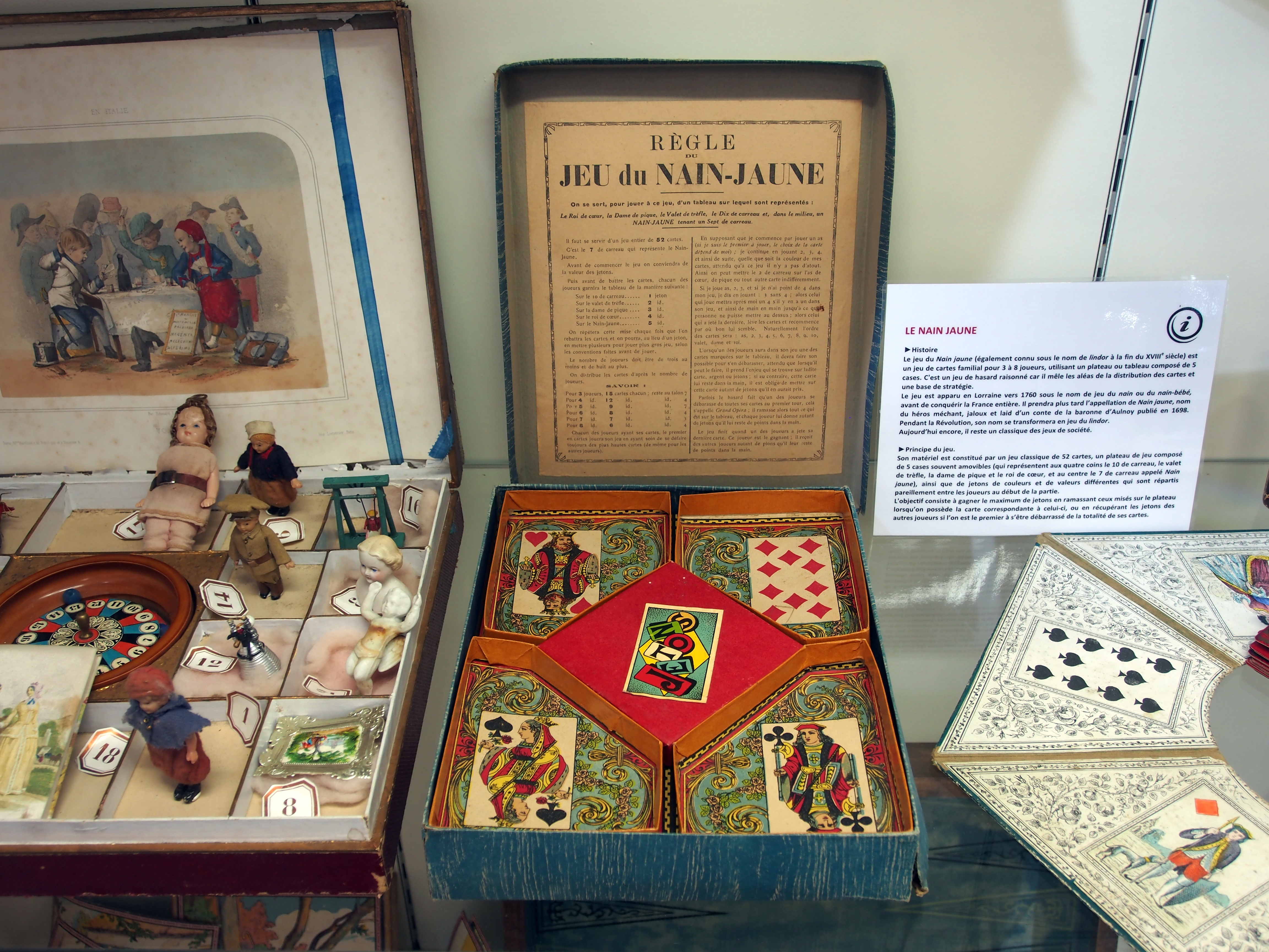 Photographed at Musée du jouet de Colmar in France.